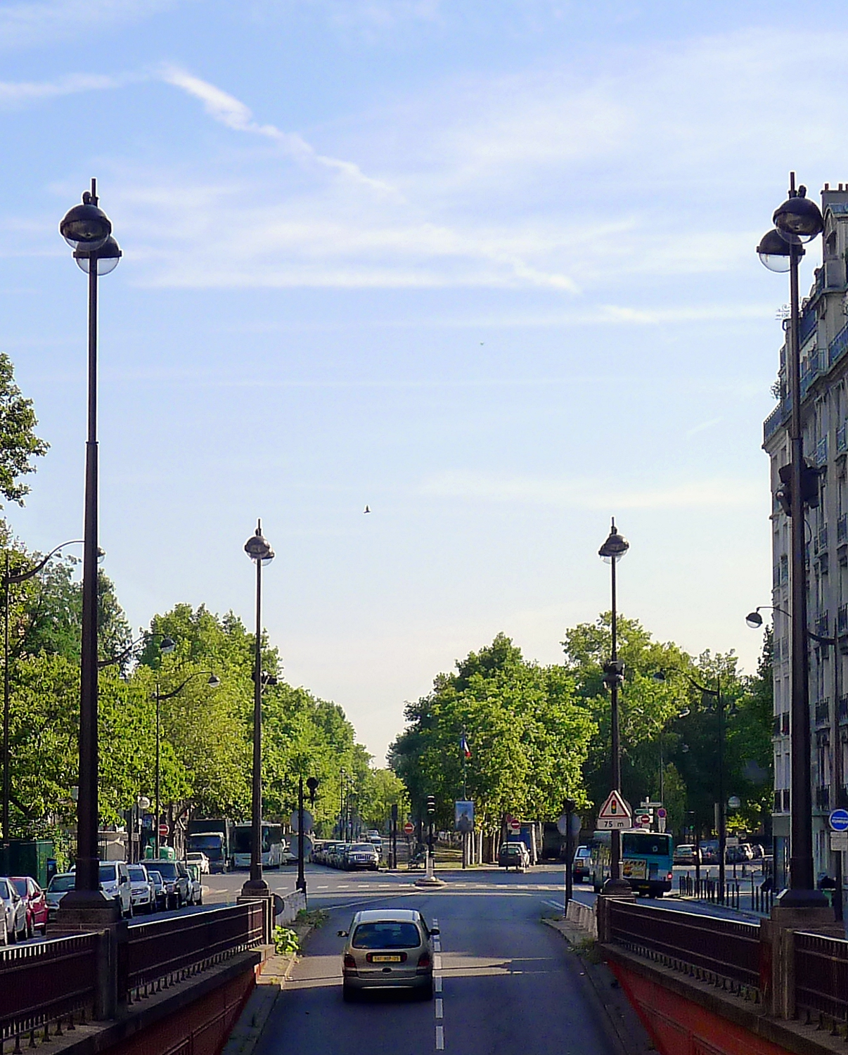 Porte de Courcelles - Paris XVII